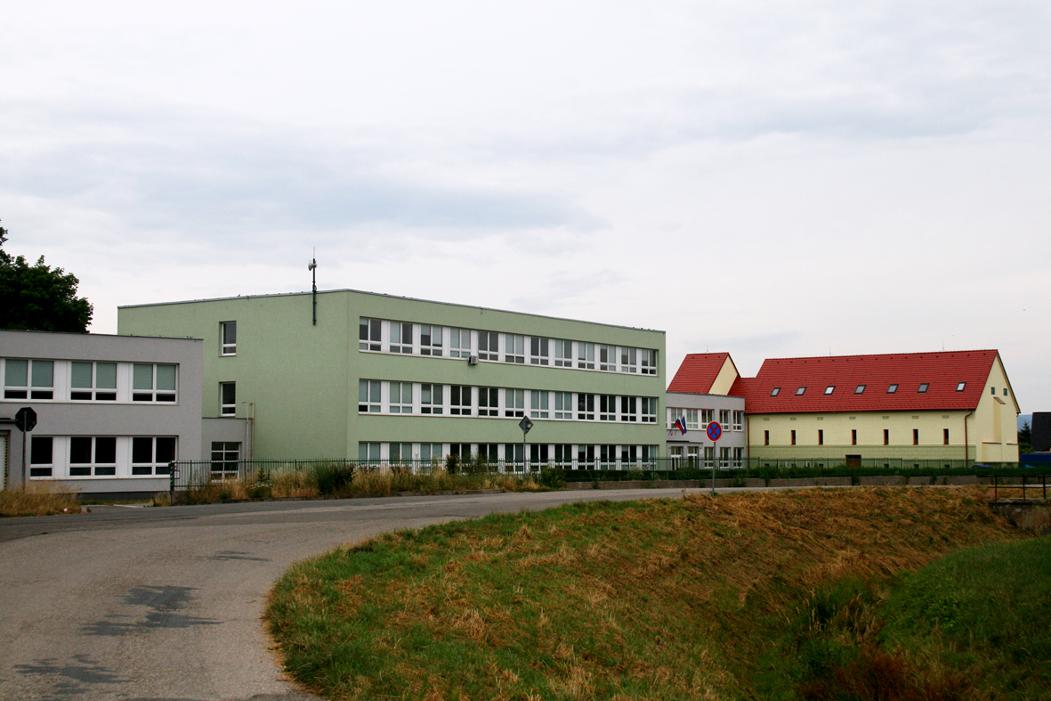 Objekty fakulty špeciálnej techniky v Záblatí